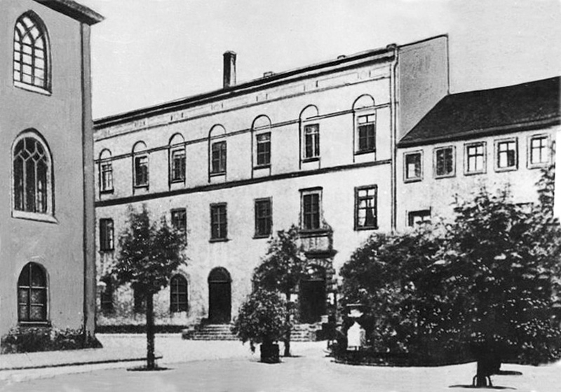 Das Konviktgebäude im Paulinerhof der Un iversität Leipzig um 1890. Links das Mittelpaulinum.